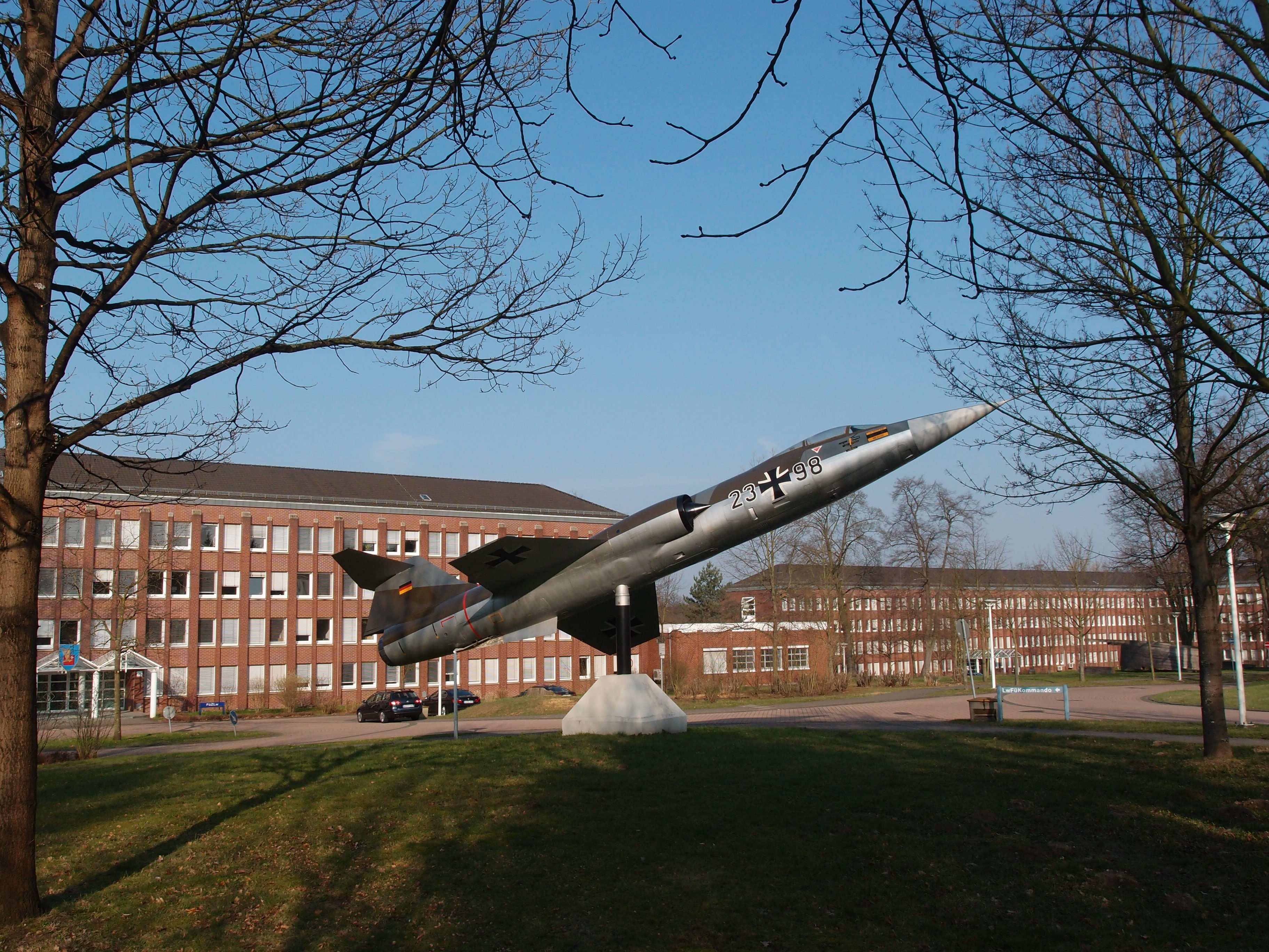 "Starfighter" auf Sockel - in der Lw-Kaserne Köln-Wahn Datum: 24.03.2012 Urheber: M. Pfeiffer alias Benutzer:Gordito1869 privates Fotoarchiv des Urhebers Hinweis: In der Lw-Kaserne Wahn besteht (außerhalb von mil. Sperrzonen) grundsätzlich kein Fotografierverbot